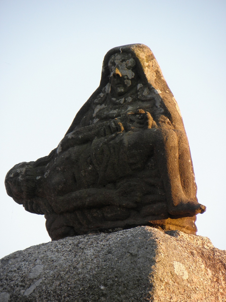 Pietà a l'entrée nord de l'enclos paroissial de Ploudiry.